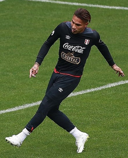 Paolo Guerrero durante un entrenamiento del Mundial 2018